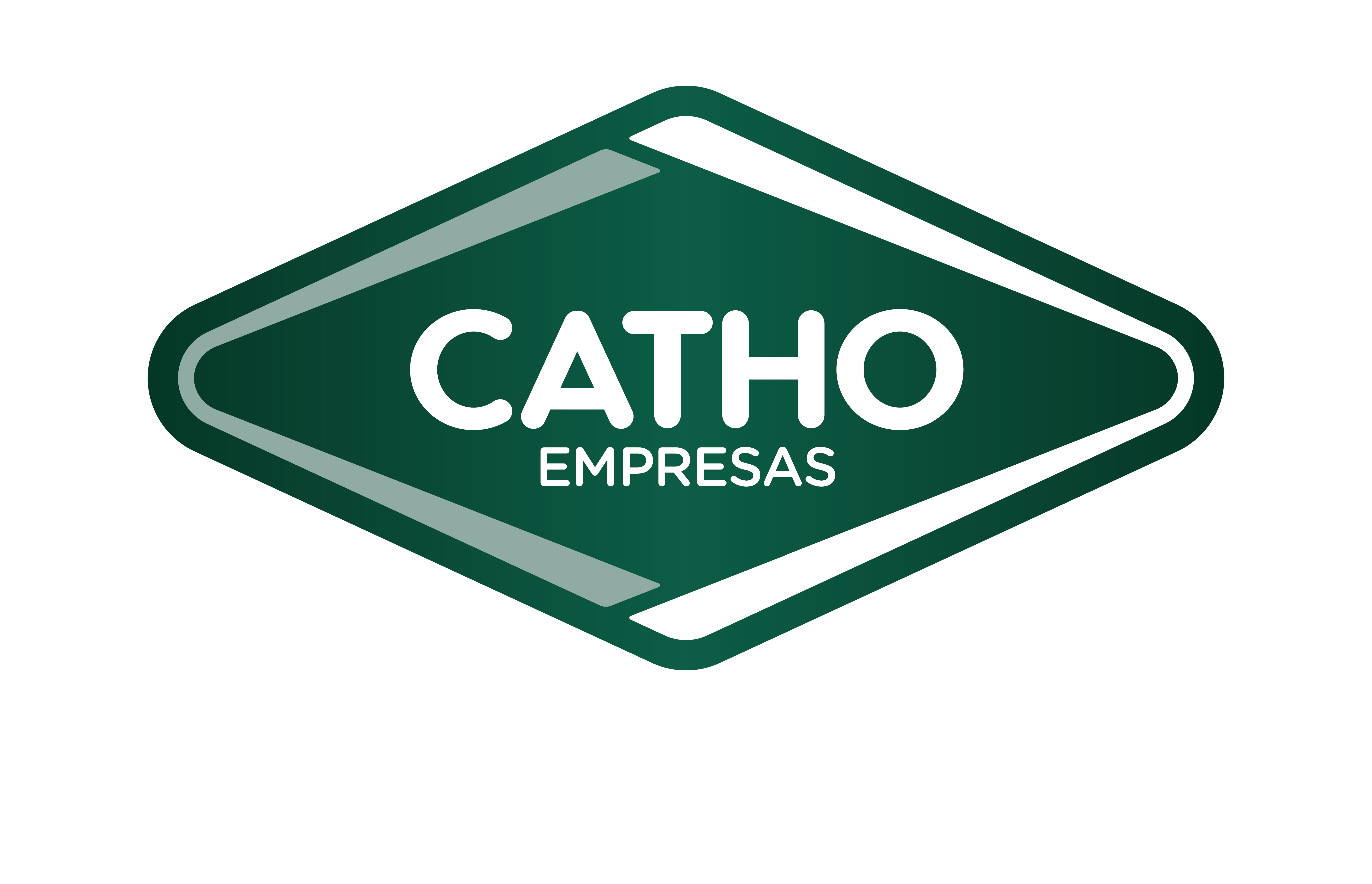 Logo Catho Empresas